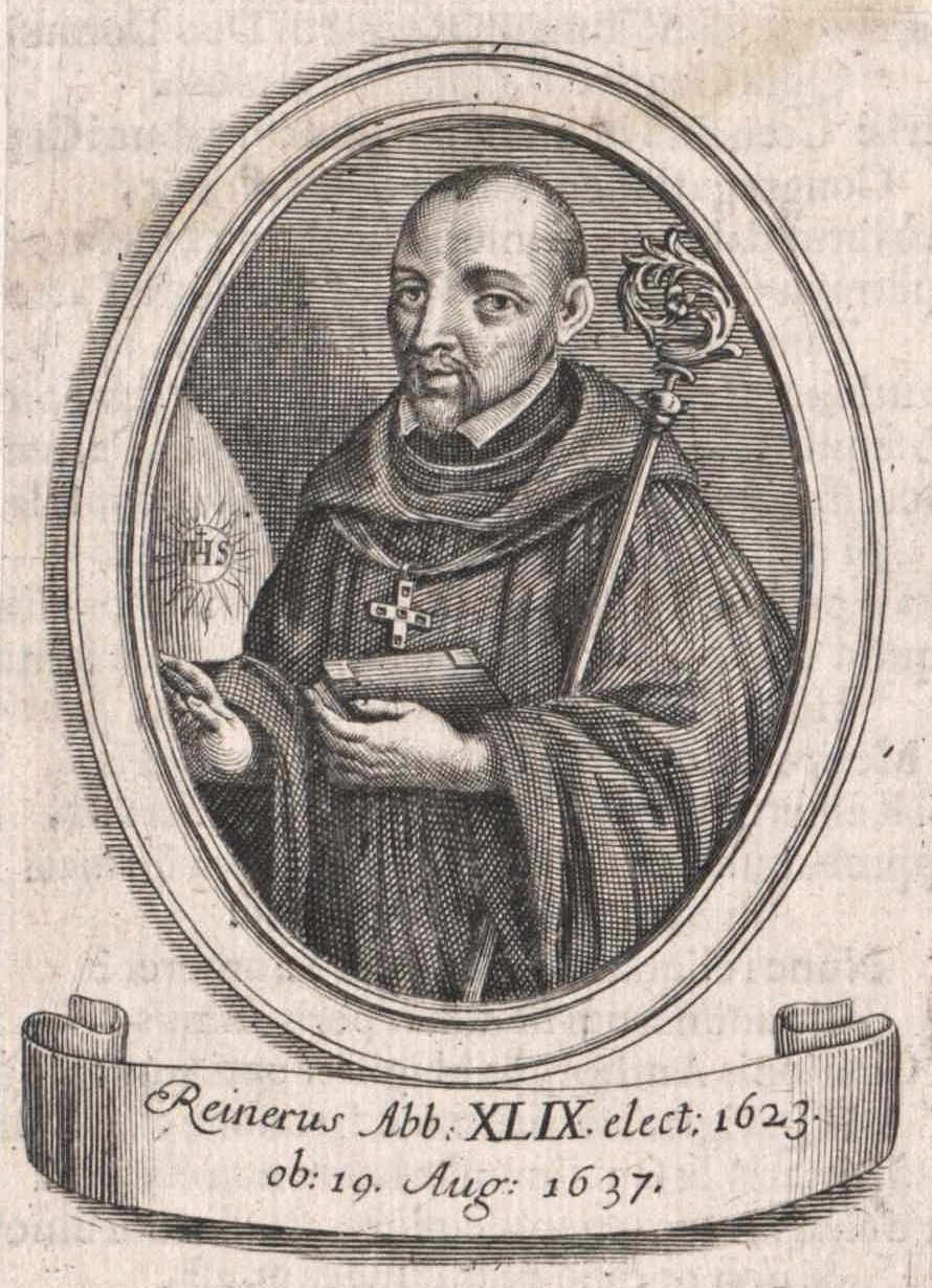 Reiner von Landau (1585-1637), Jesuit, Abt von Stift Melk